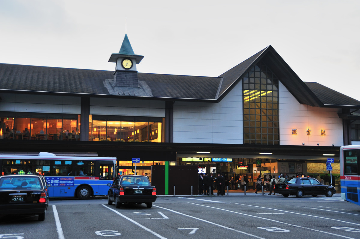 JR鎌倉車站 東口